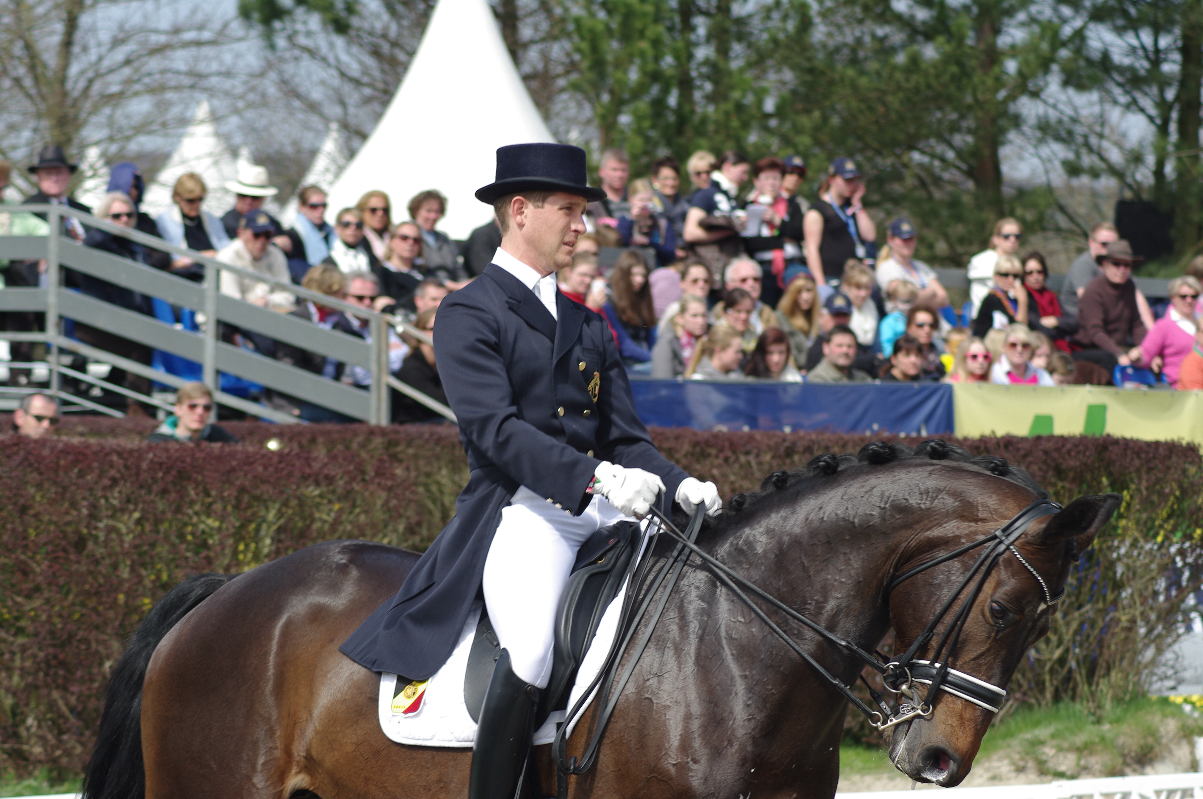 Horses & Dreams 2013: Nr. 6 CDI4* FEI Grand Prix Kür (Preis der Firma Ullrich Equine international GmbH - "in Memoriam George Theodorescu") Simon Missiaen mit "Vradin"